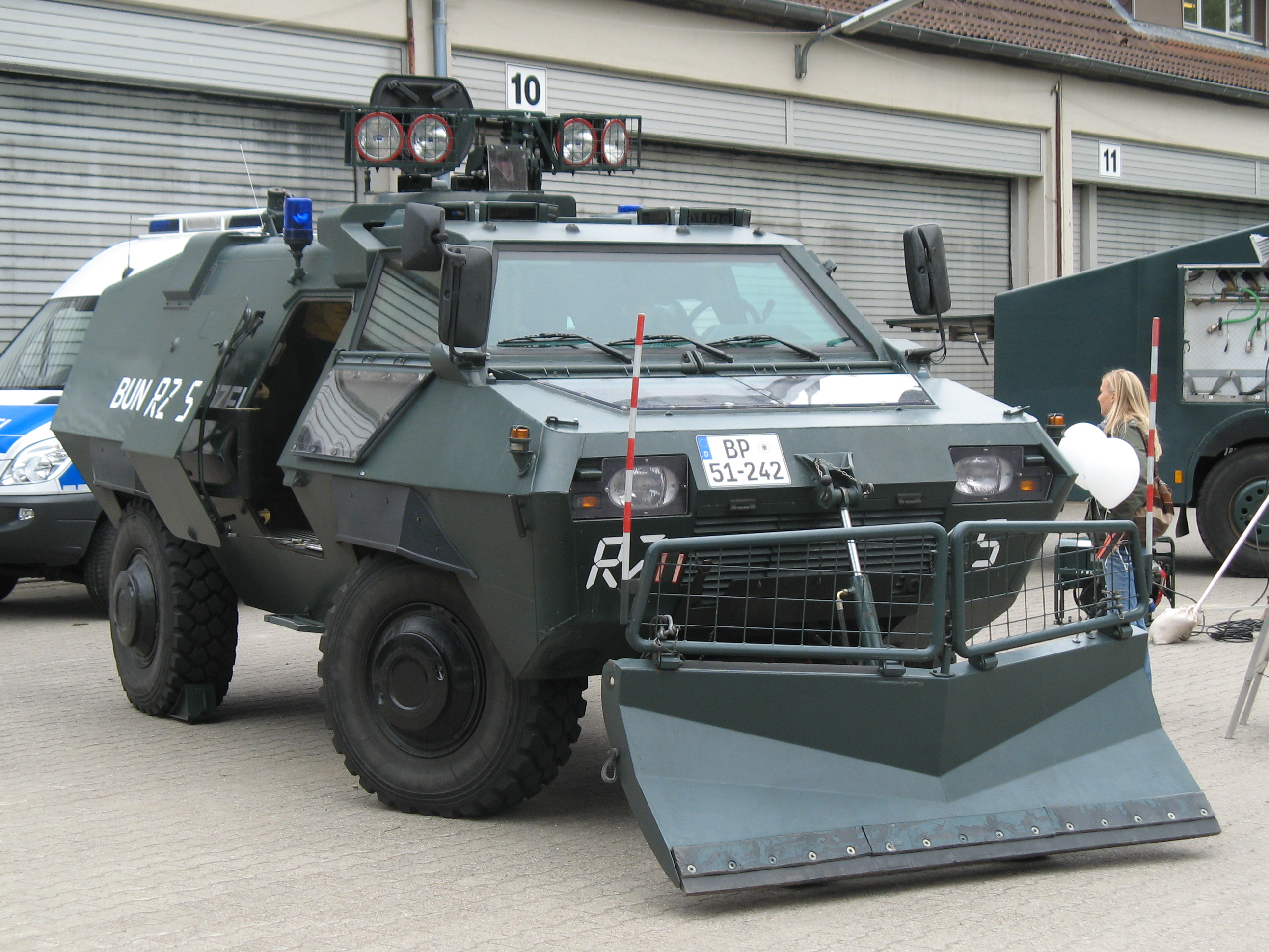 Bundespolizei Geschützter Sonderwagen SW 4 (TM-170). Ausgestellt am Tag der offenen Tür der Bundespolizei (ehemalig Bundesgrenzschutz) anlässlich des 60 Jährigen Jubiläum.